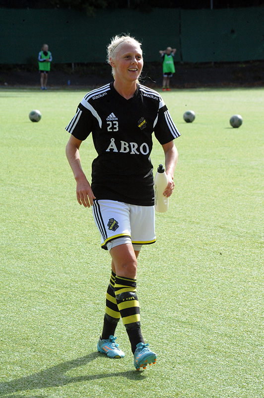 Elin Bragnum (AIK)